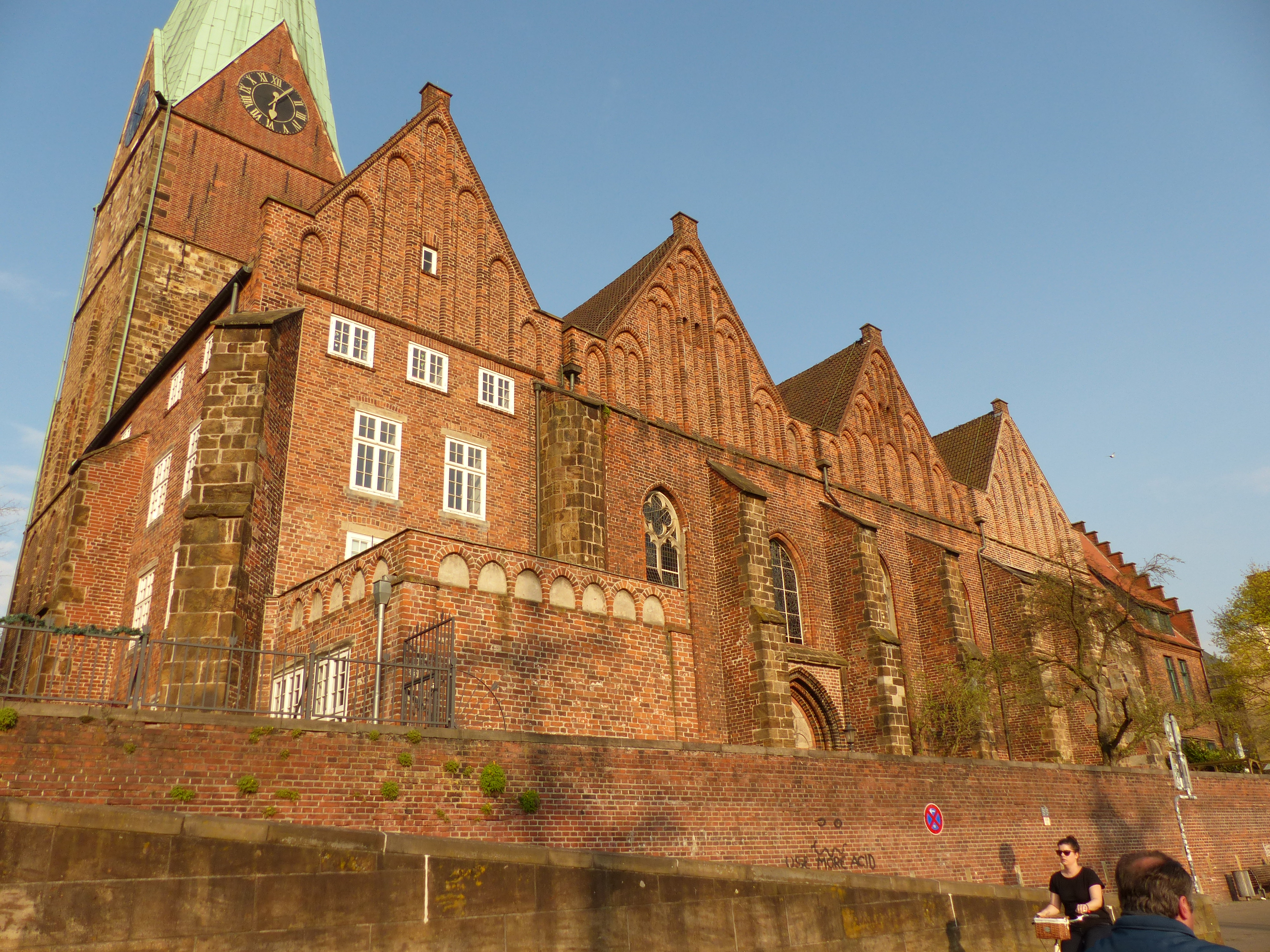 Martinikirche in der Bremer Altstadt, Weserseite vom Martiniufer aus gesehen: Backsteingotik, aber an der Nordwestseite sandsteinverblendeter Turm und Sandstein an den Strebepfeilern; prächtiges Südportal.